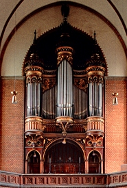 Orgel in der Kirche St. Johannis-Harvestehude in Hamburg (Deutschland)